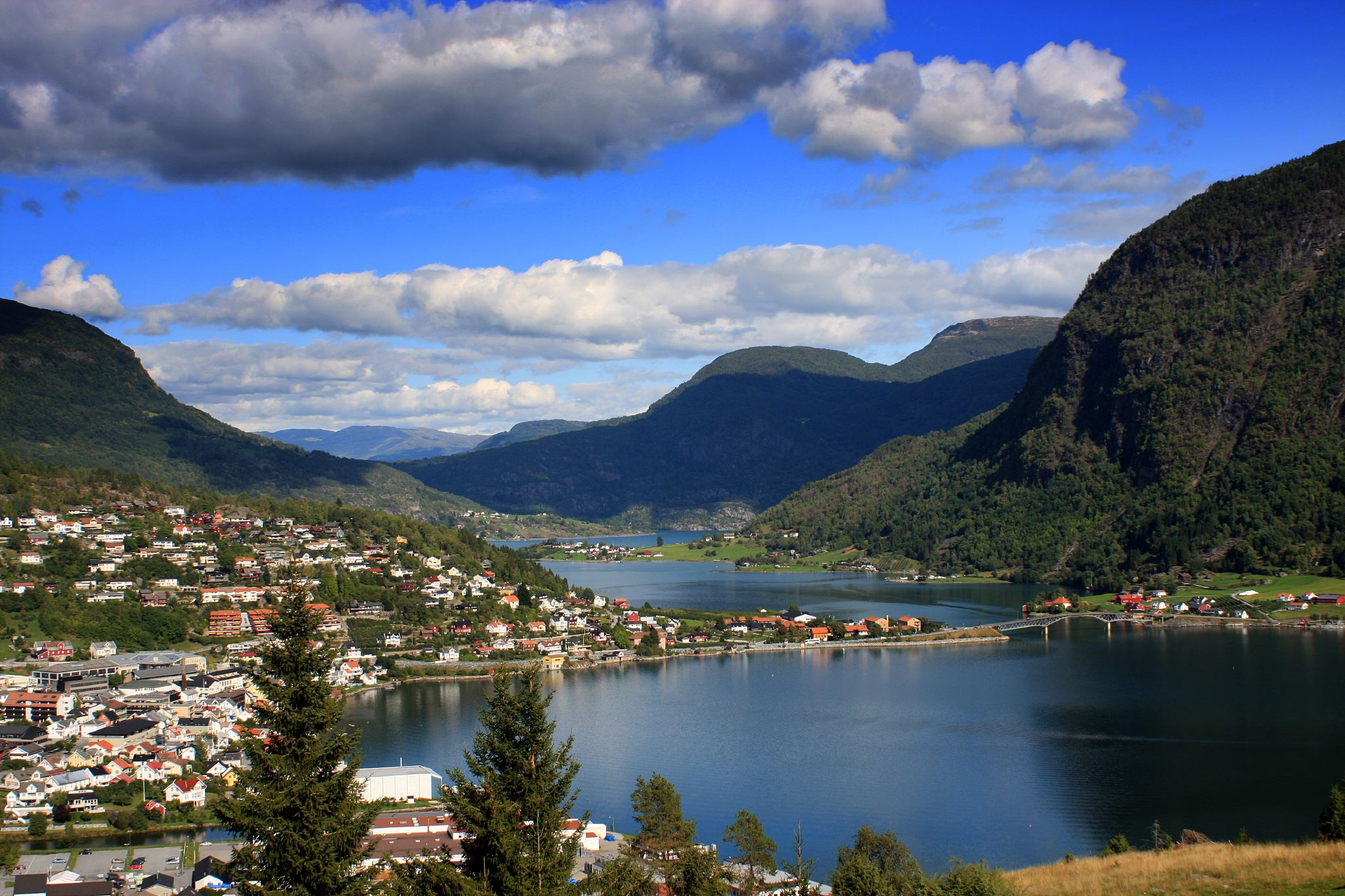 Sogndal